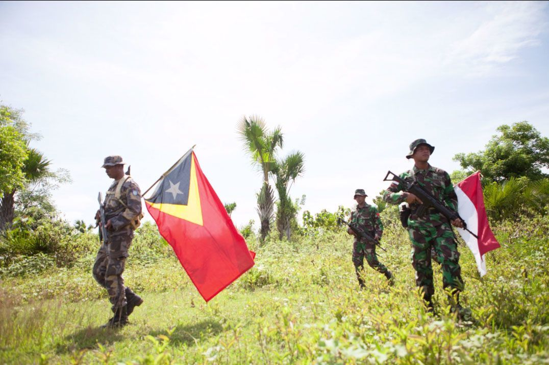 Osttimoresische Grenzpolizei (Unidade da Polícia de Fronteiras UPF), zusammen mit Soldaten der indonesischen Armee auf Patrouille